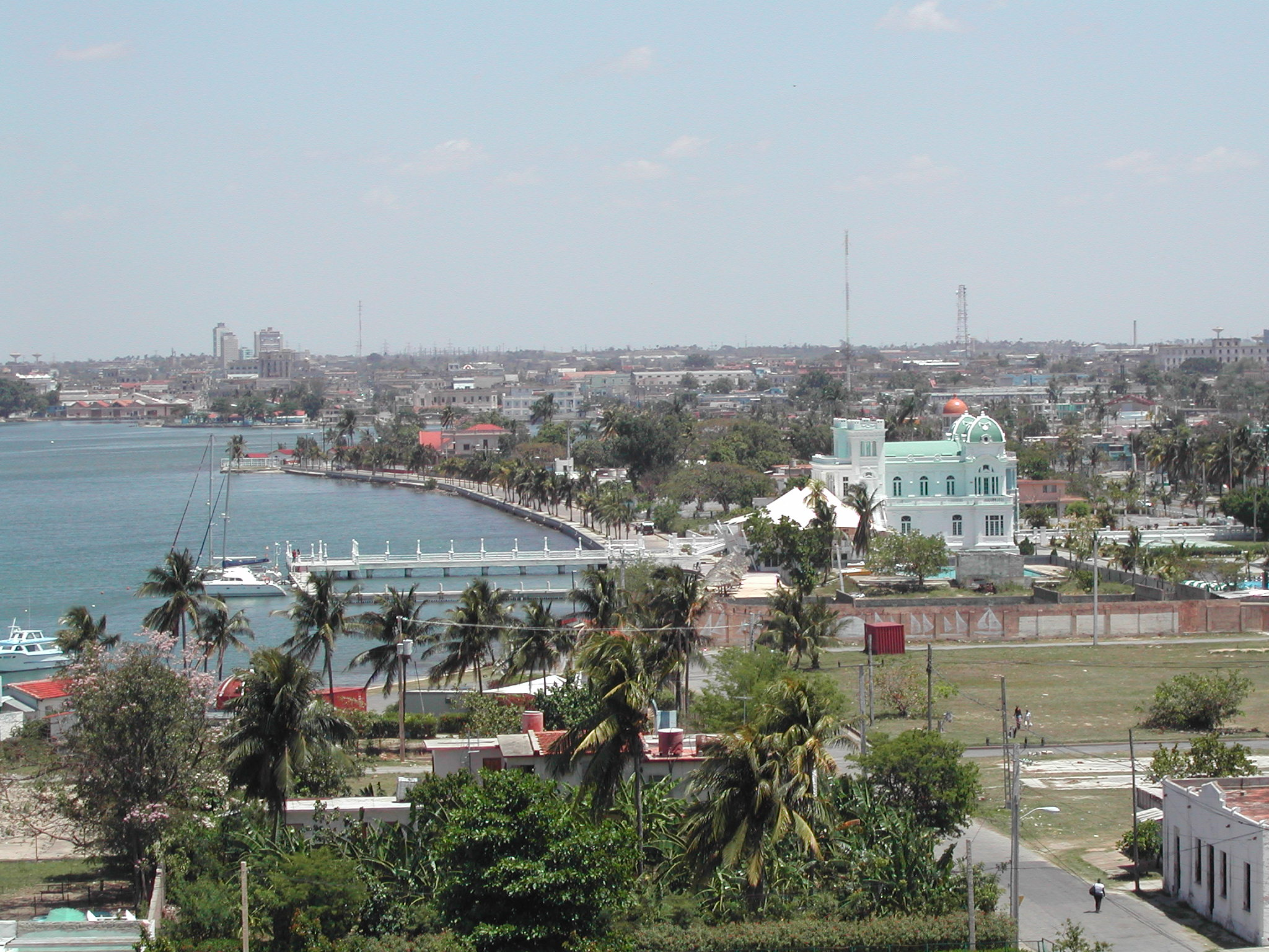 Bléck iwwer Cienfuegos